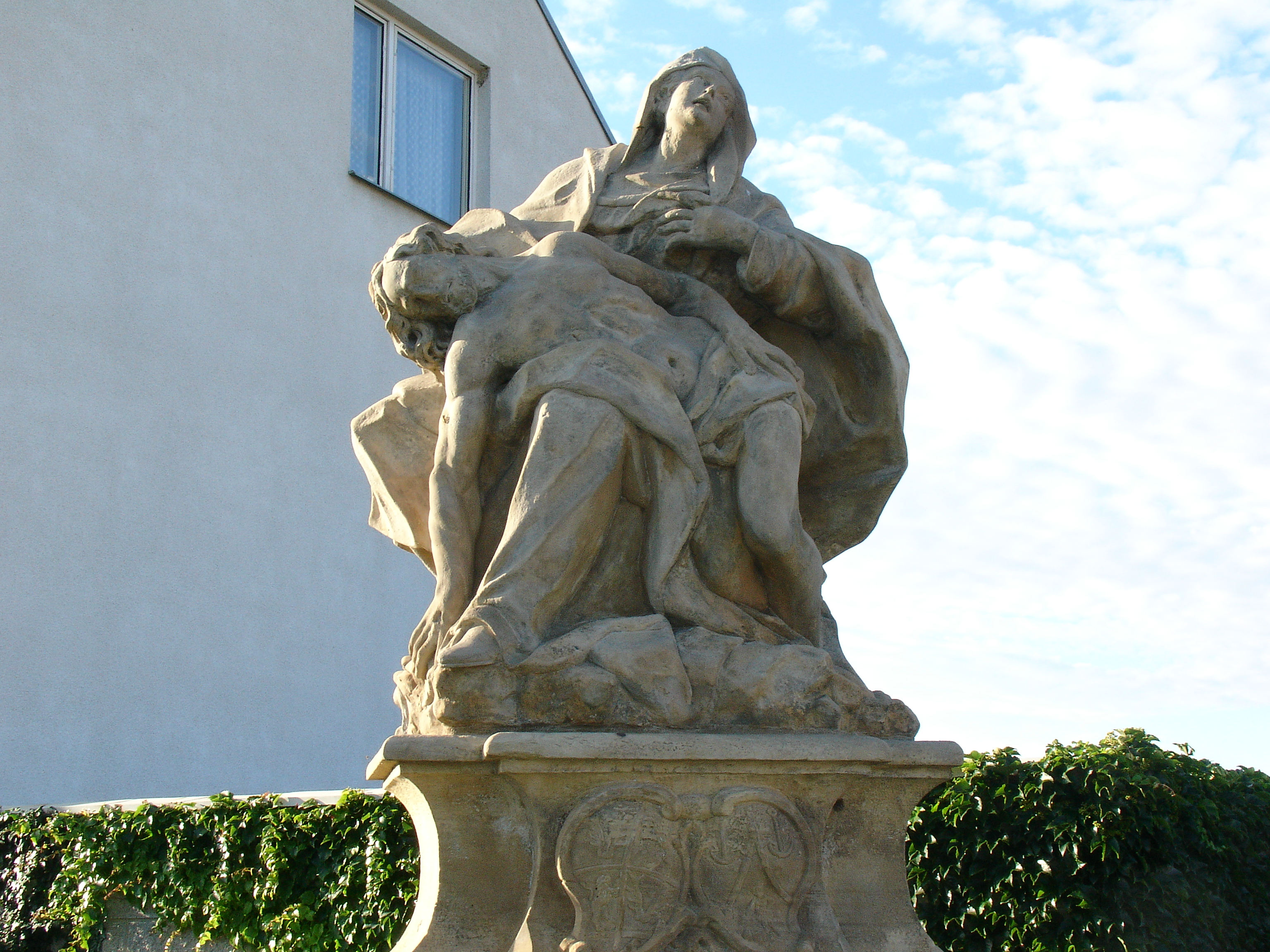 Sousoší Piety (Střížov), rozcestí, Střížov